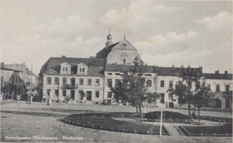 Rynek w Słupcy podczas okupacji niemieckiej, tzw. Kraj Warty (lata 1939-1945).